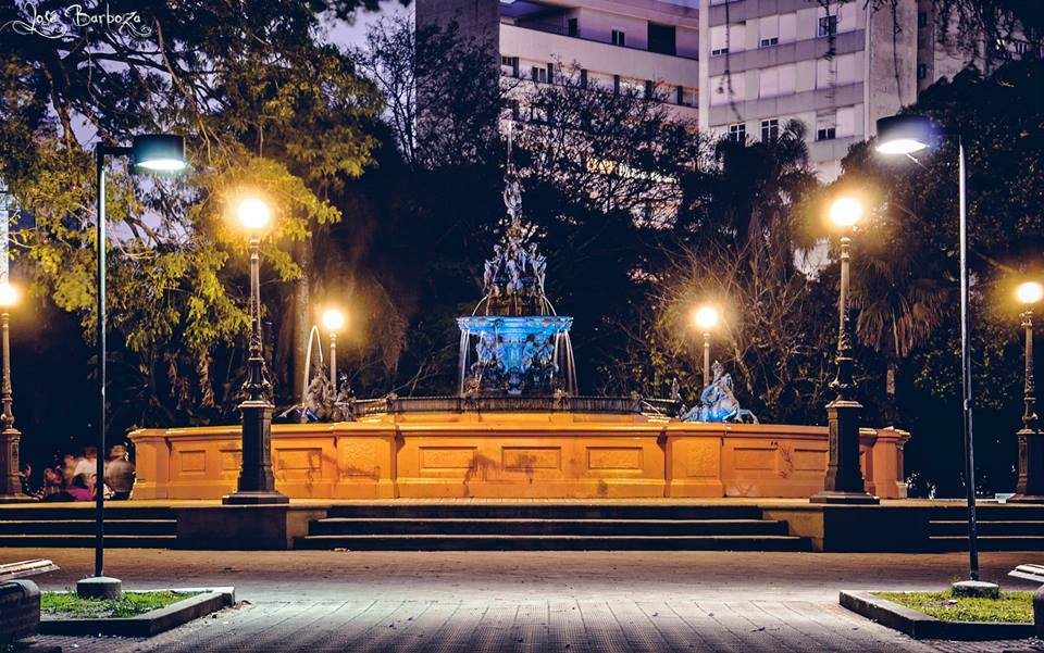 Fonte das Mereidas